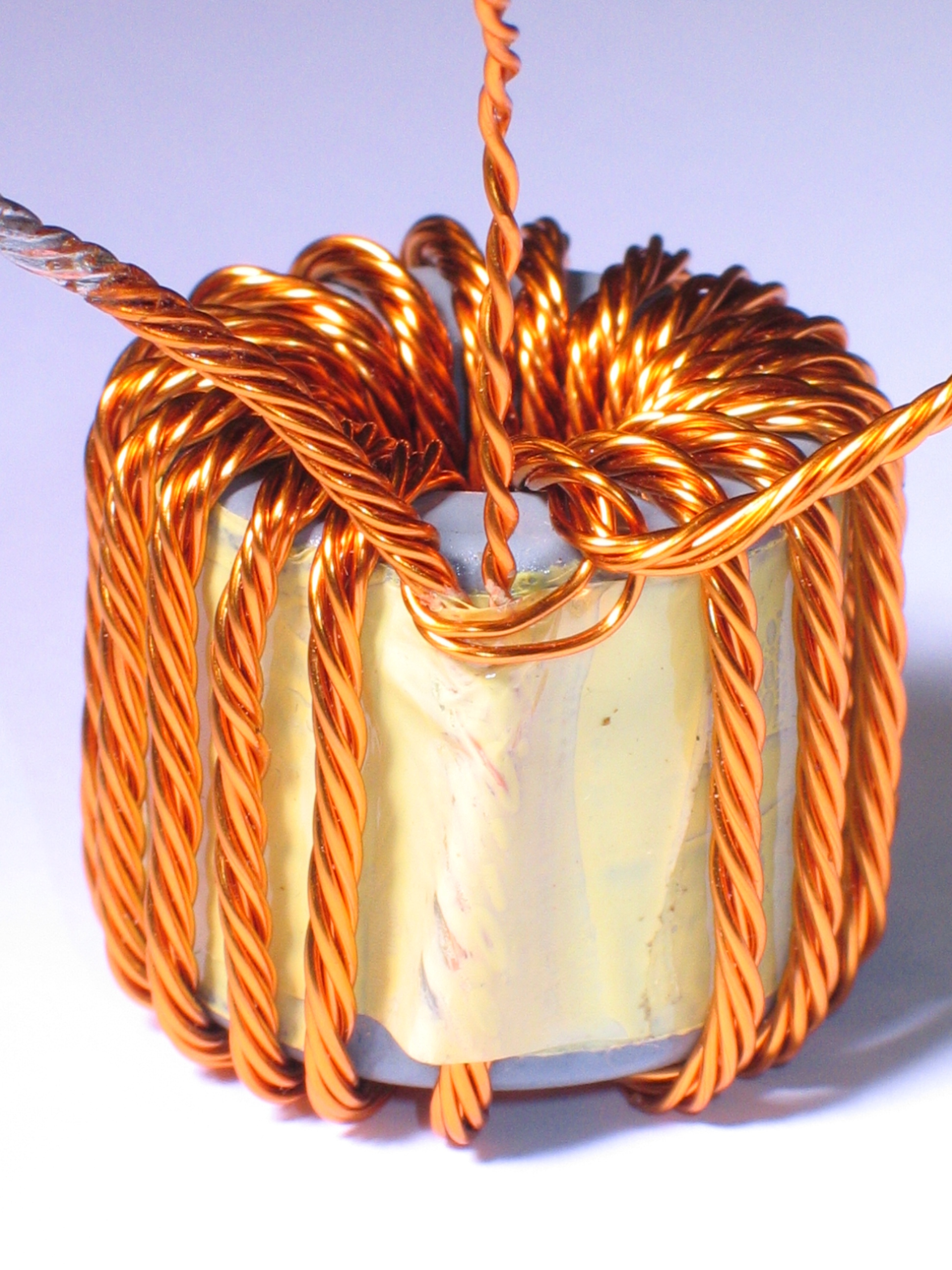 « Transformateur » de convertisseur Flyback 250 W à 50 kHz, dimensions : Ø 28 L 32, masse 90 gr. Utilisation : étage générateur de puissance constante de ballast pour lampe HMI. Vue côté sorties.